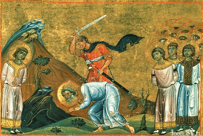 Мученик Арефа и с ним 4299 мучеников